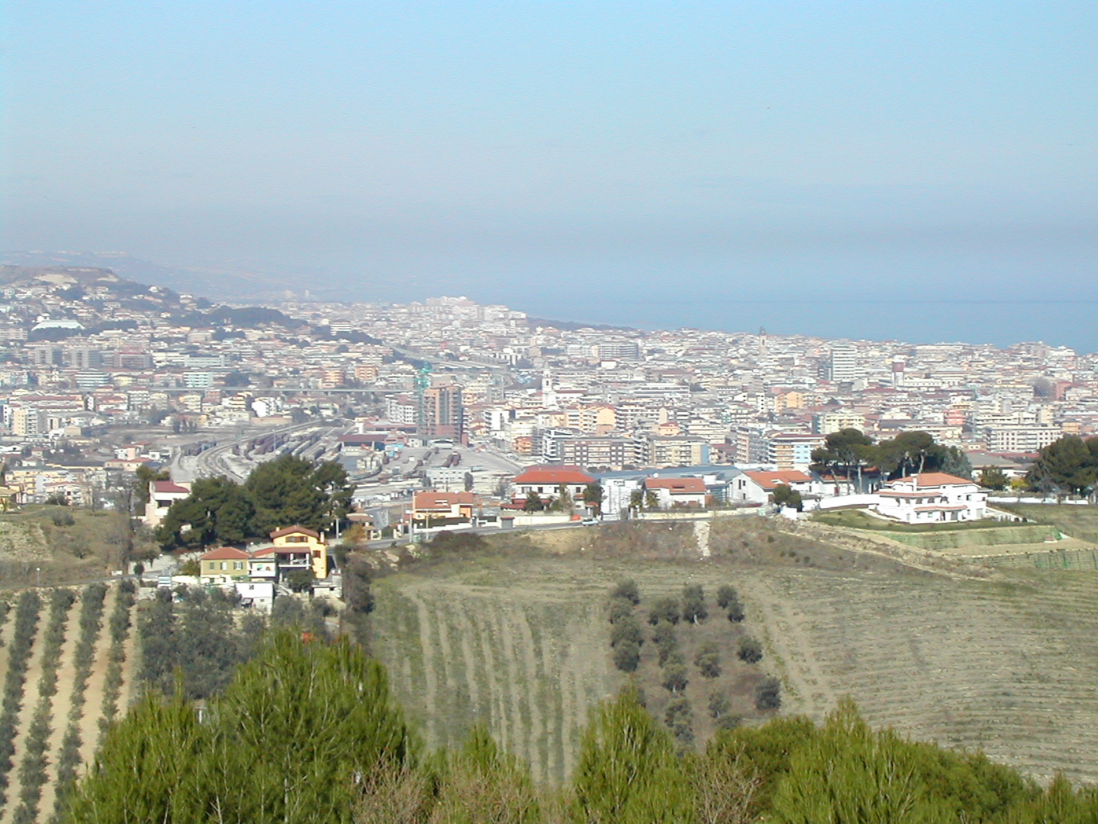 Panorama di Pescara dai colli del sud